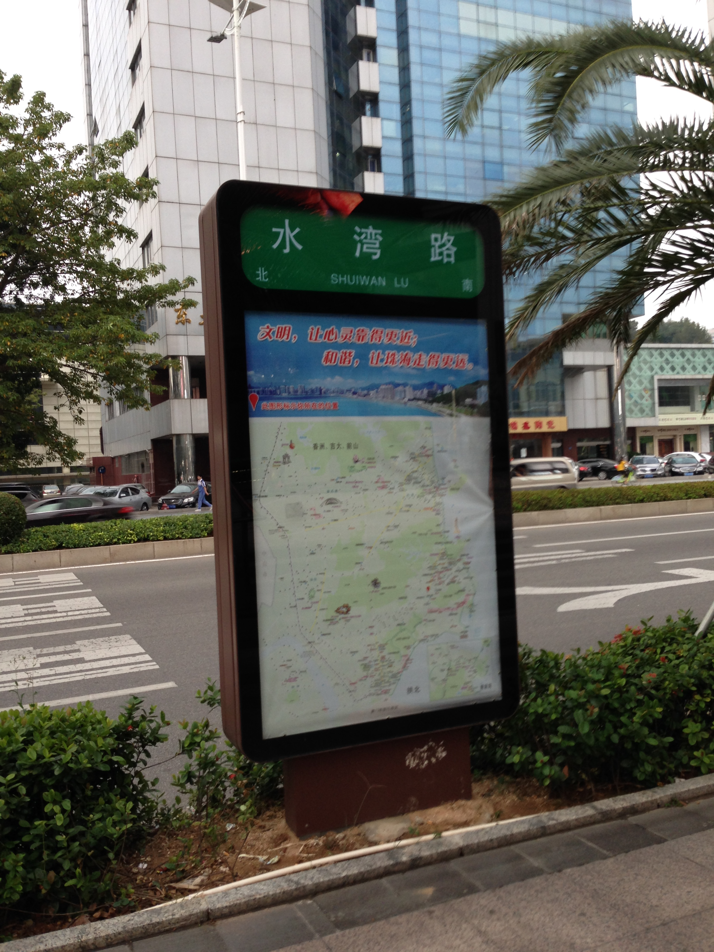 珠海水湾路